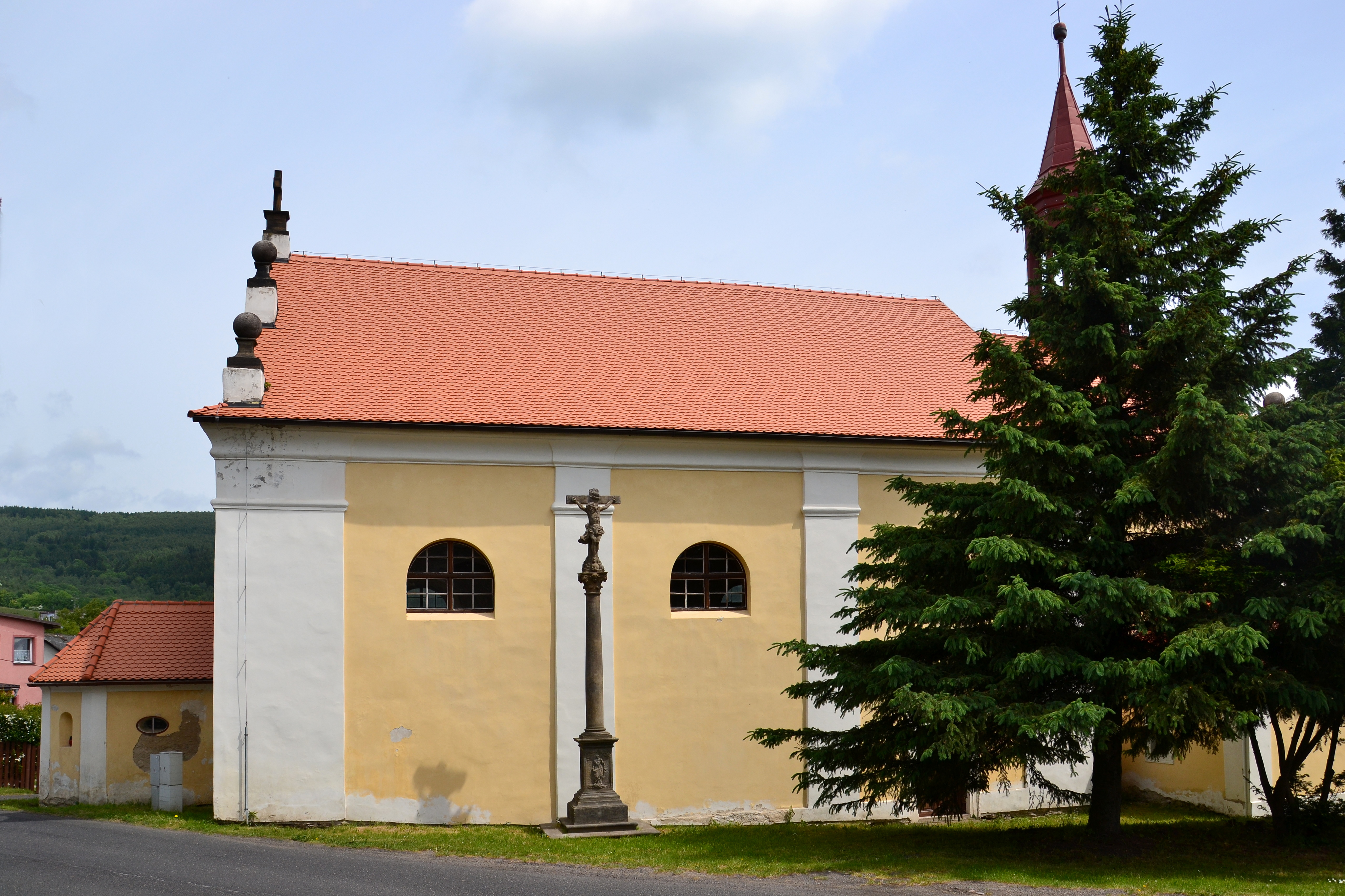 Kostel Nejsvětější Trojice, sakristie